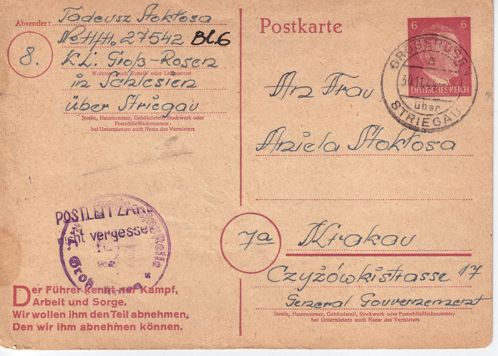 Häftlingspostkarte aus dem KZ Groß Rosen vom November 1944 Dienststempel: "Postzensurstelle KL Groß Rosen" Poststempel: "Grossrosen (über Striegau)